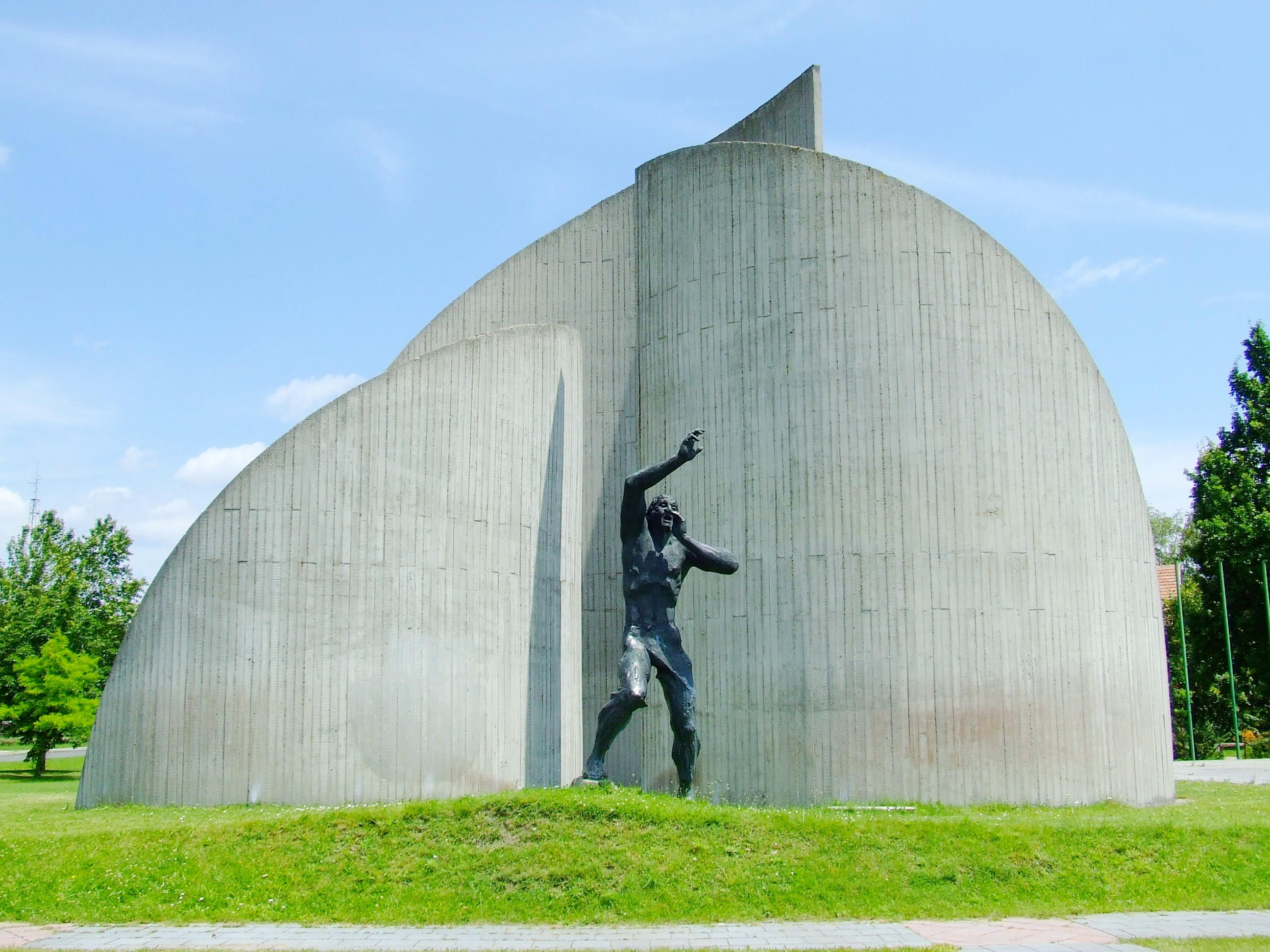 Marton László szobrászművész Hírnök, és Kerényi József építész Három tavasz című alkotása Kiskunhalason (1975)